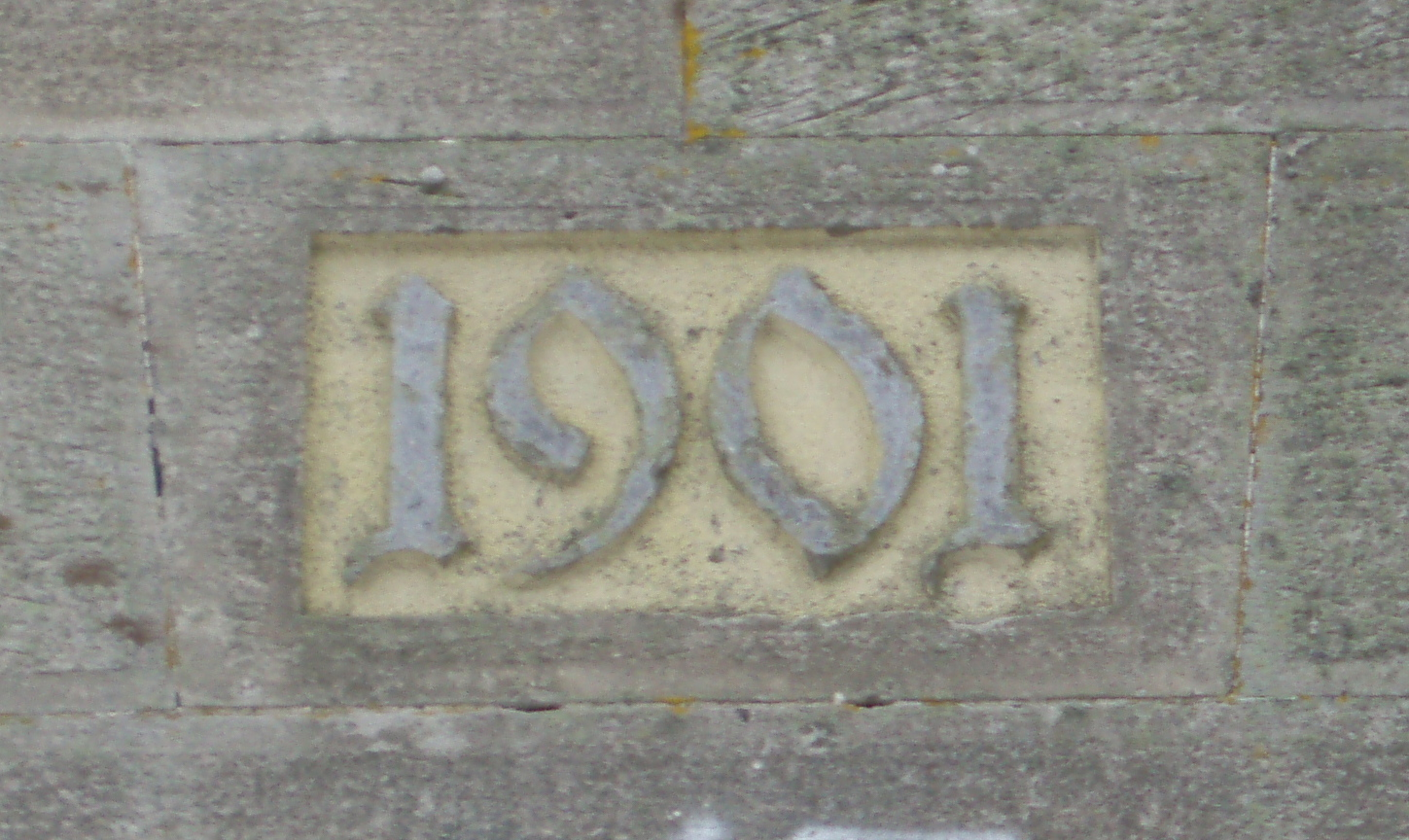 Bismarckturm Coburg, Jahreszahl 1901 auf der Westseite des Turmpylons über der Metalltür